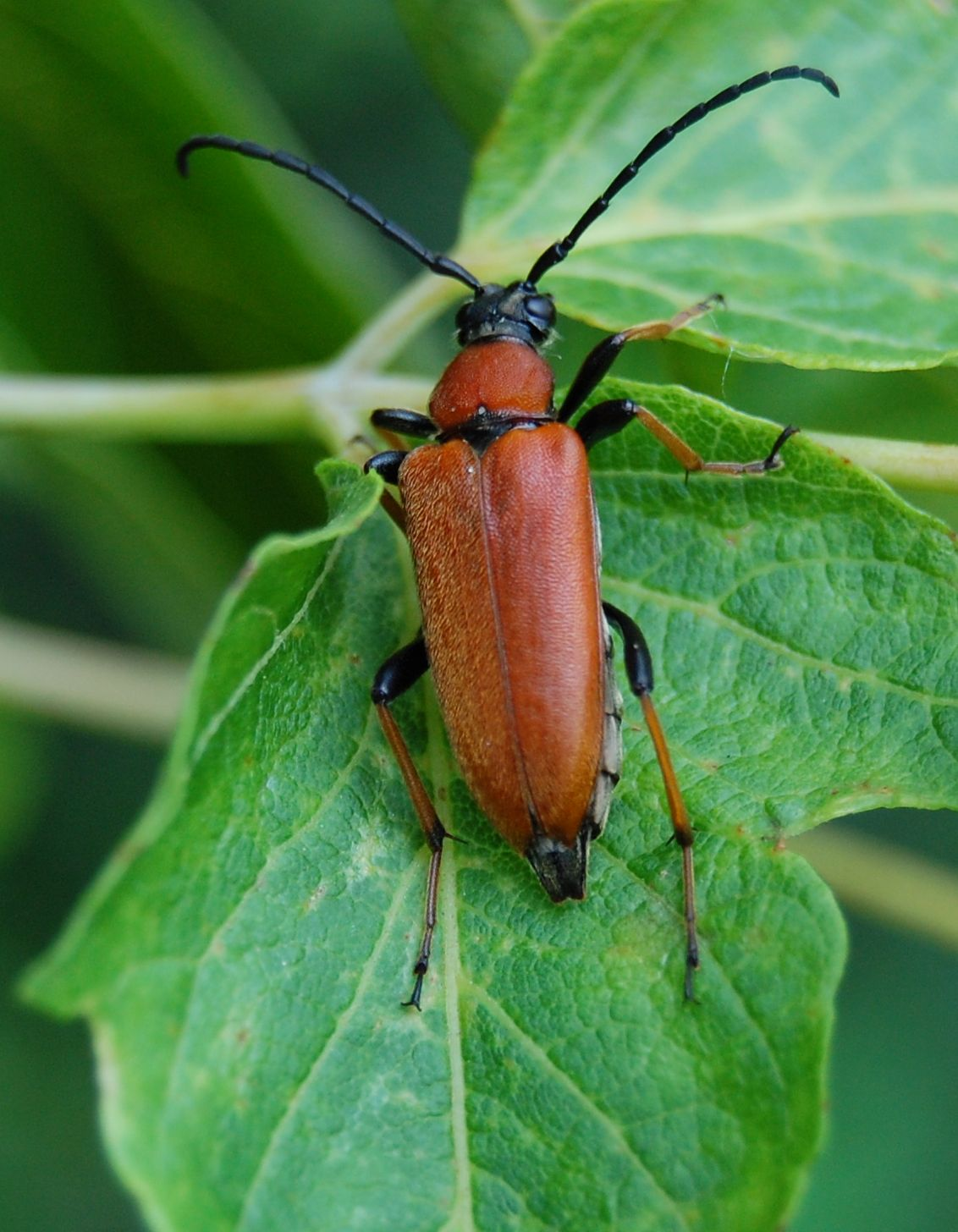 Stictoleptura rubra, female